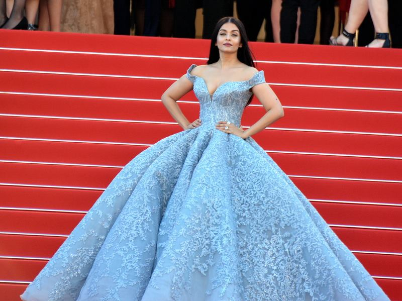 Aishwarya Rai au festival de Cannes